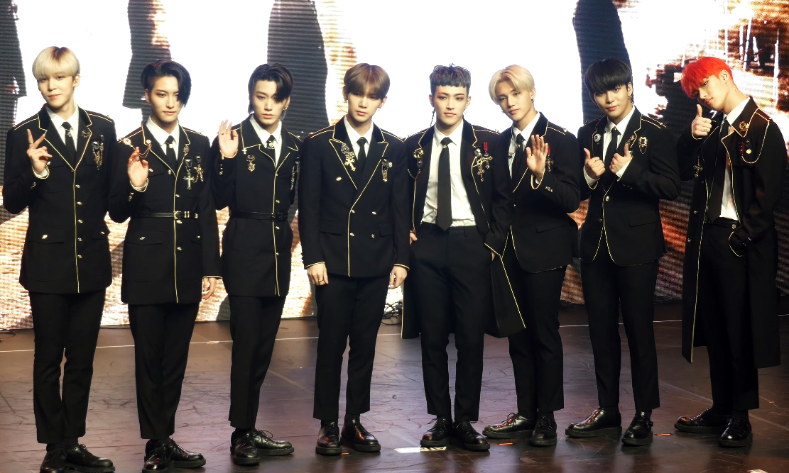 8일 오후 서울시 강남구 청담동 일지아트홀에서 보이 그룹 에이티즈(ATEEZ)의 첫 정규 앨범 'TREASURE EP.PIN : All To Action' 쇼케이스가 열려 에이티즈(홍중, 성화, 윤호, 여상, 산, 민기, 우영, 종호)가 포토타임을 갖고 있다. 타이틀곡 'WONDERLAND(원더랜드)'는 에이티즈가 지금까지 보여준 장르들의 완결판으로 트레져 시리즈 여정속 울려 퍼지는 '에이티즈표 행진곡'이다. 다채로운 변화를 시도하며 차별화된 콘셉트를 자랑해 온 에이티즈는 정규앨범을 통해 한층 성숙해진 음악적 역량과 무대를 장악하는 화려한 화려한 퍼포먼스로 대중을 사로잡을 예정이다.